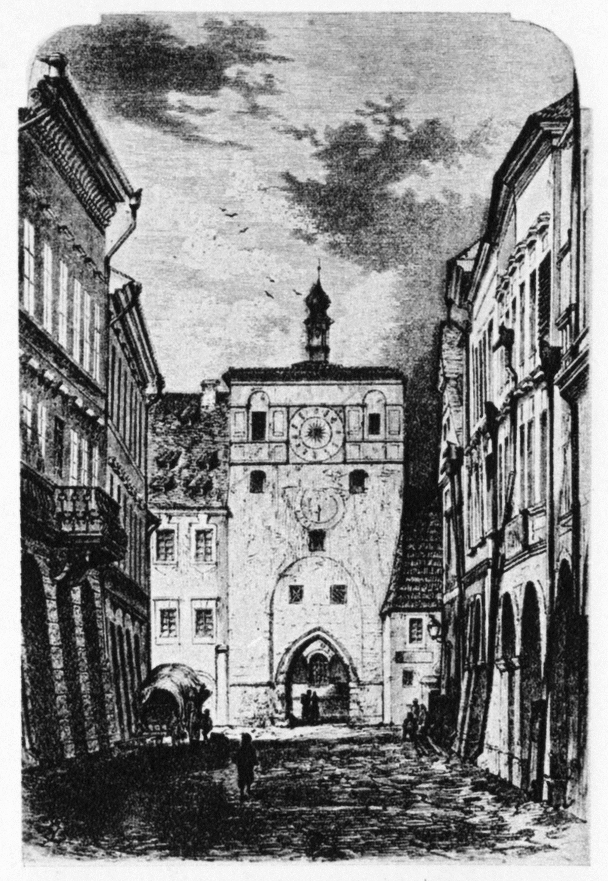 Pražská (Písecká) brána na konci Krajinské třídy (Třídy 5. května) v Českých Budějovicích